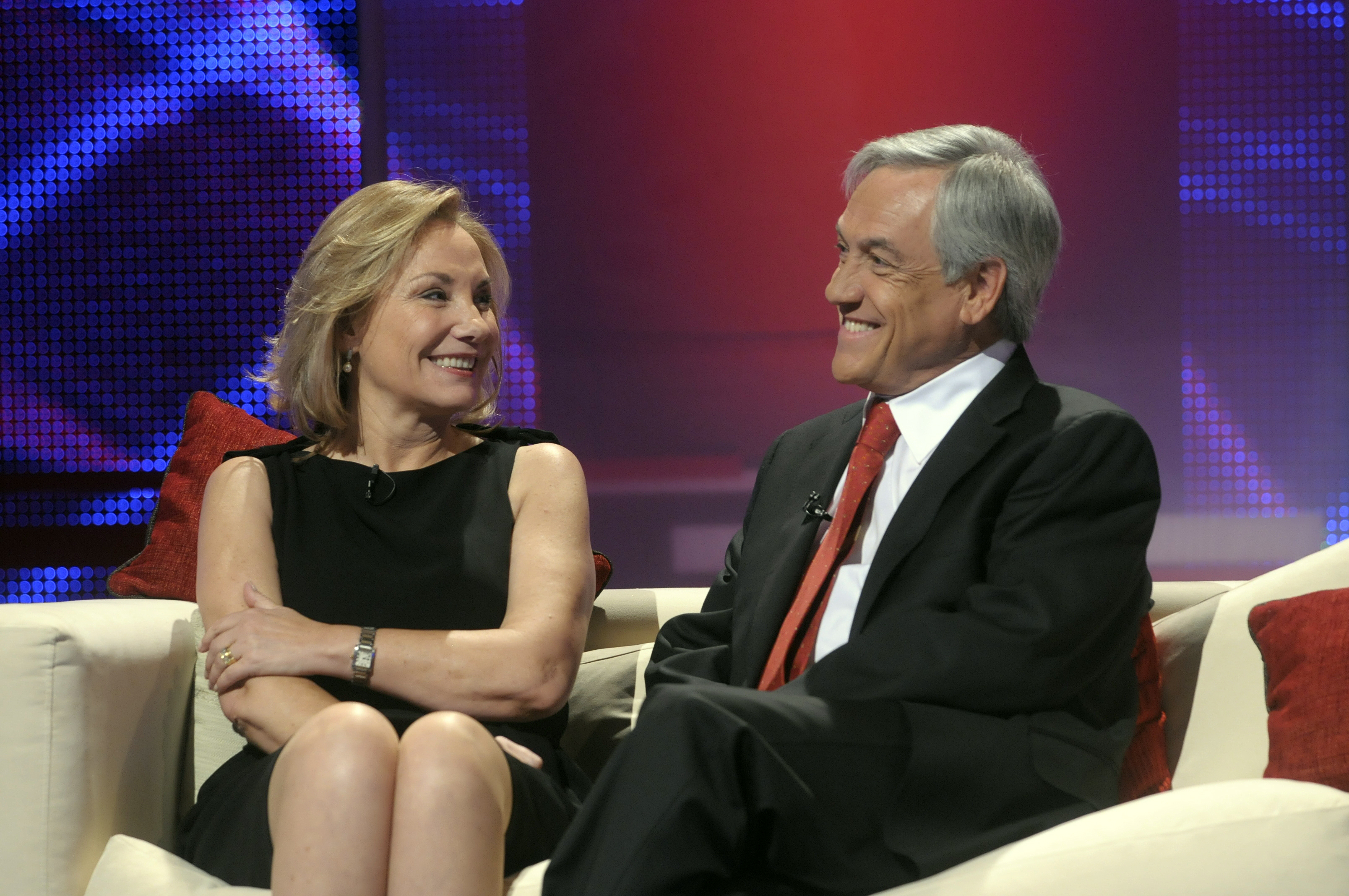 Año 2010